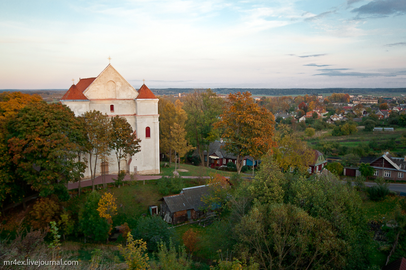 Фарны касцёл з гары